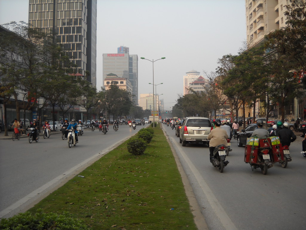 Phố Láng Hạ, trung tâm Thành phố Hà Nội（𡨸喃：庯廊下，中心城庯河內）